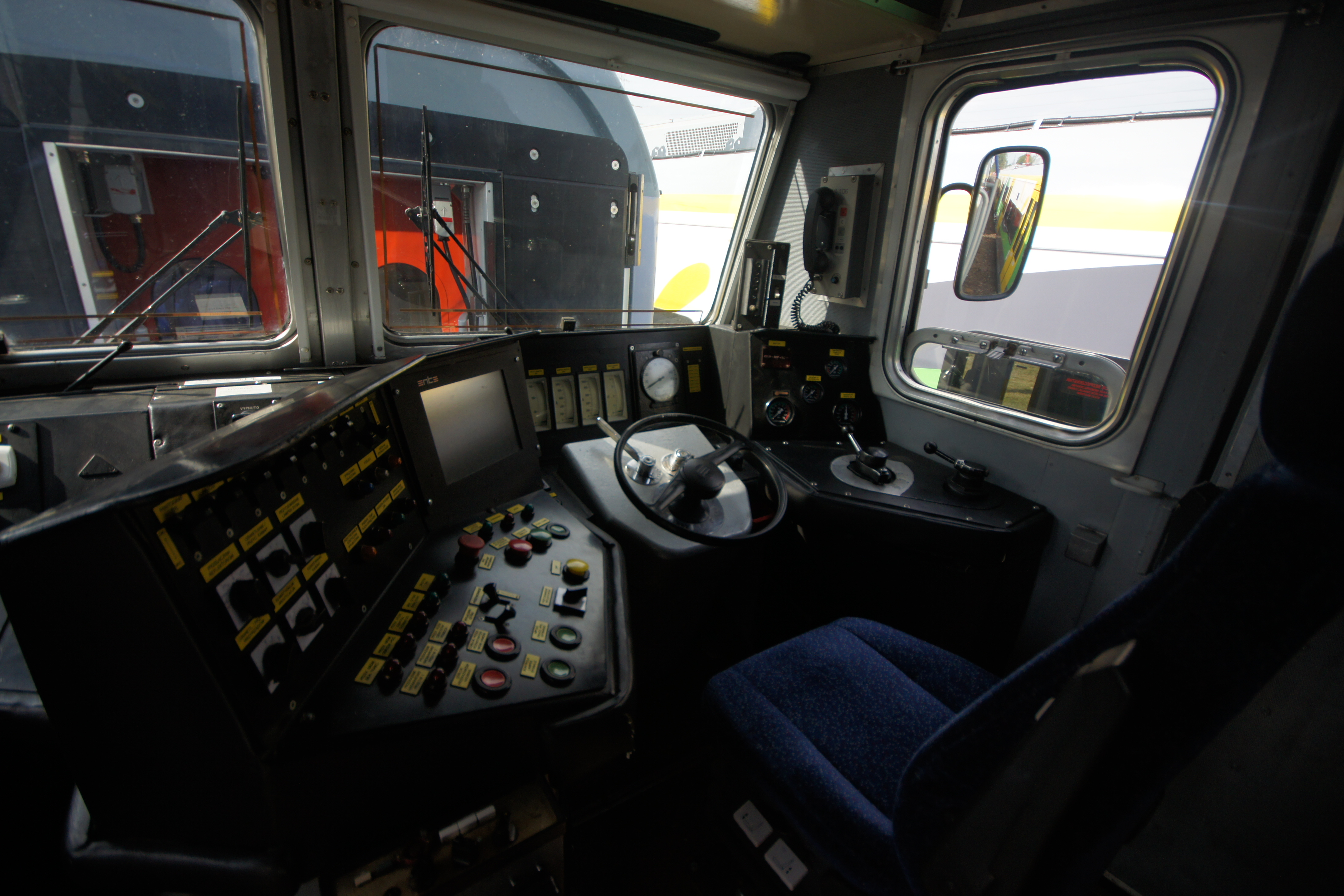 PKP Intercity - kabina EP09